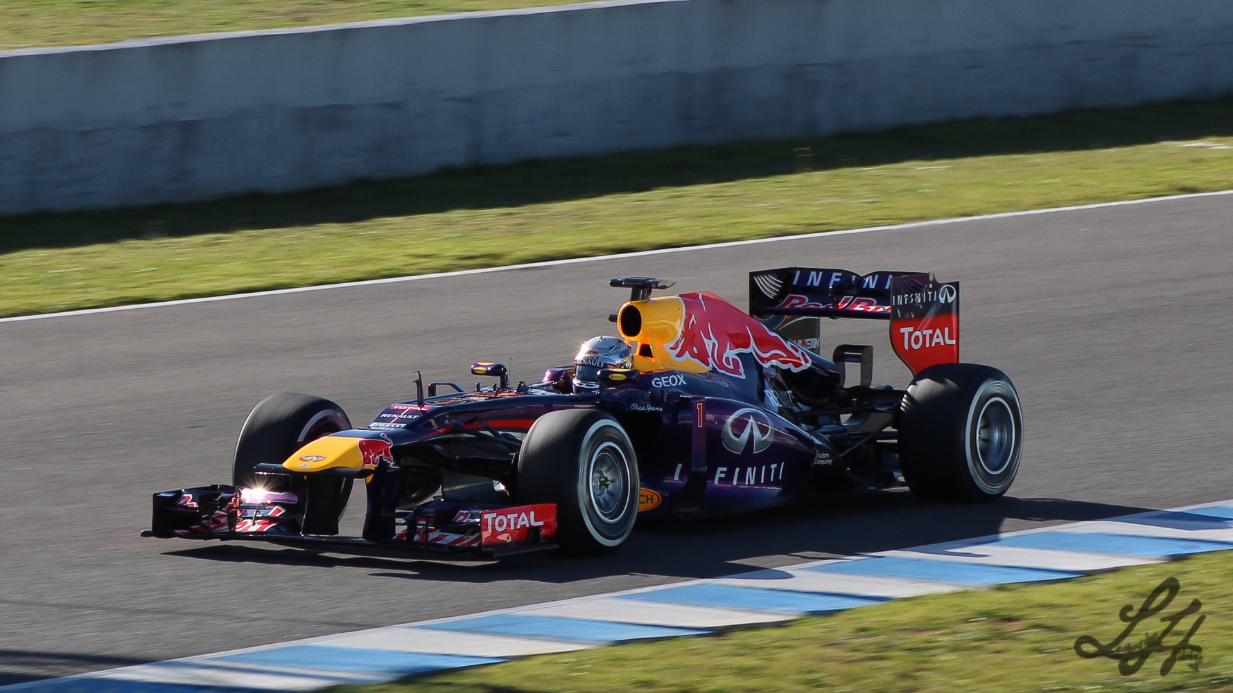 Fotos hechas el 7 de Febrero de 2013 en el circuito de Jerez, plena pre-temporada de F1. Would you like to follow me on Instagram and Twitter?